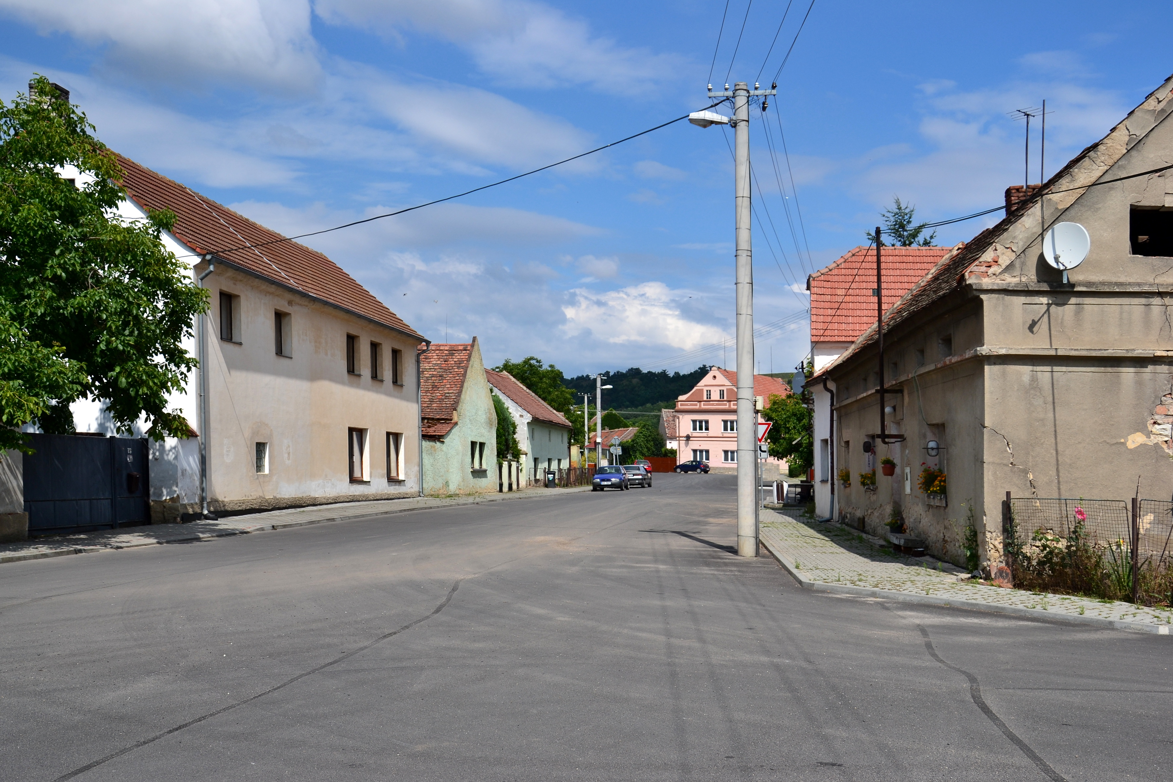 Dům č. p. 19 na hlavní ulici